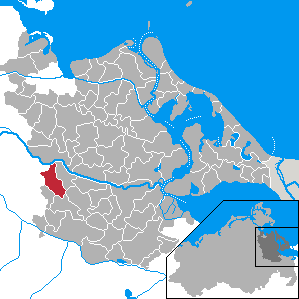 Neetzow, Landkreis Ostvorpommern, Mecklenburg-Vorpommern